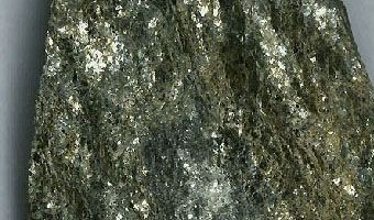 Gneiss - Bystrá, Low Tatras, Slovakia.